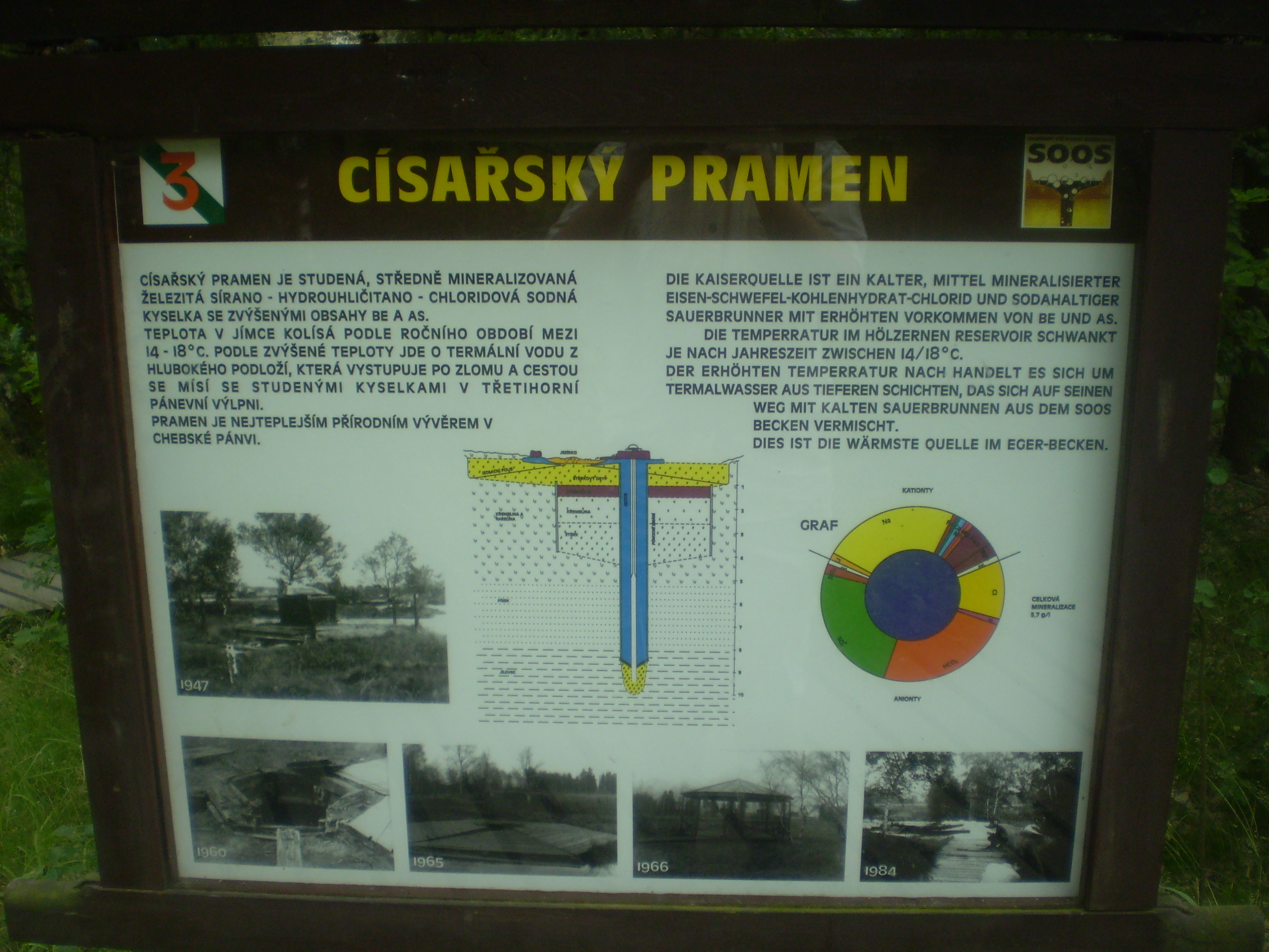 zastavení NS SOOS s názvem Císařský pramen